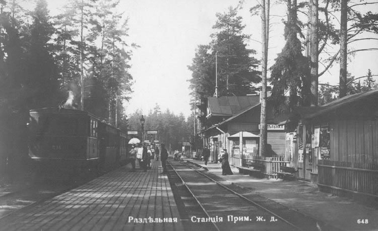 Железнодорожная станция Раздельная в 1900х годах